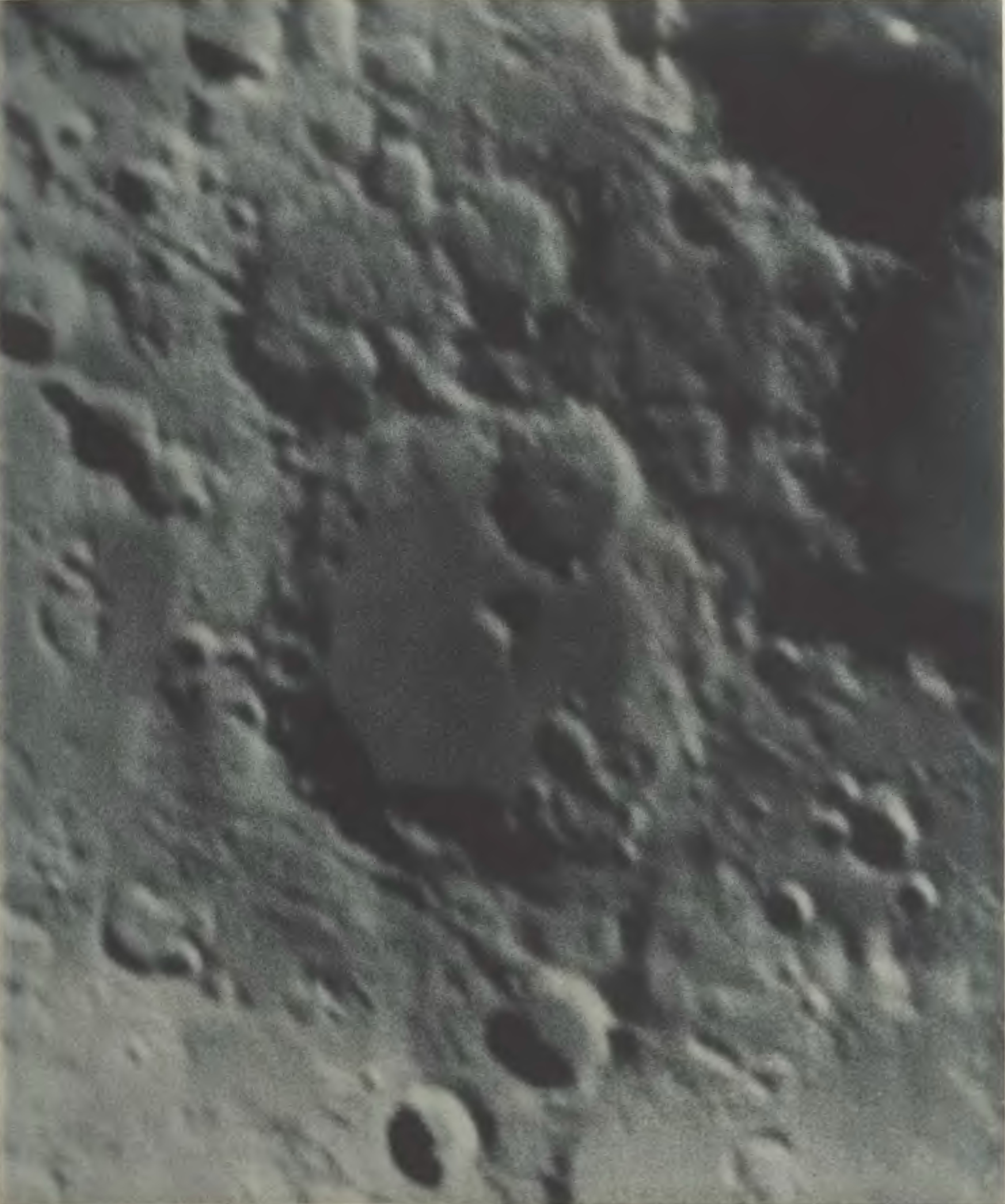 Photographischer Mond-Atlas vornehmlich auf Grund von focalen Negativen der Lick-Sternwarte im Massstabe eines Monddurchmessers von 10 Fuss ausgeführt von Professor Ladislaus Weinek. Heft II. Tafel 35